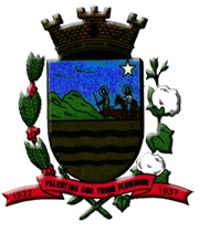 Brasão da cidade de Palestina, SP